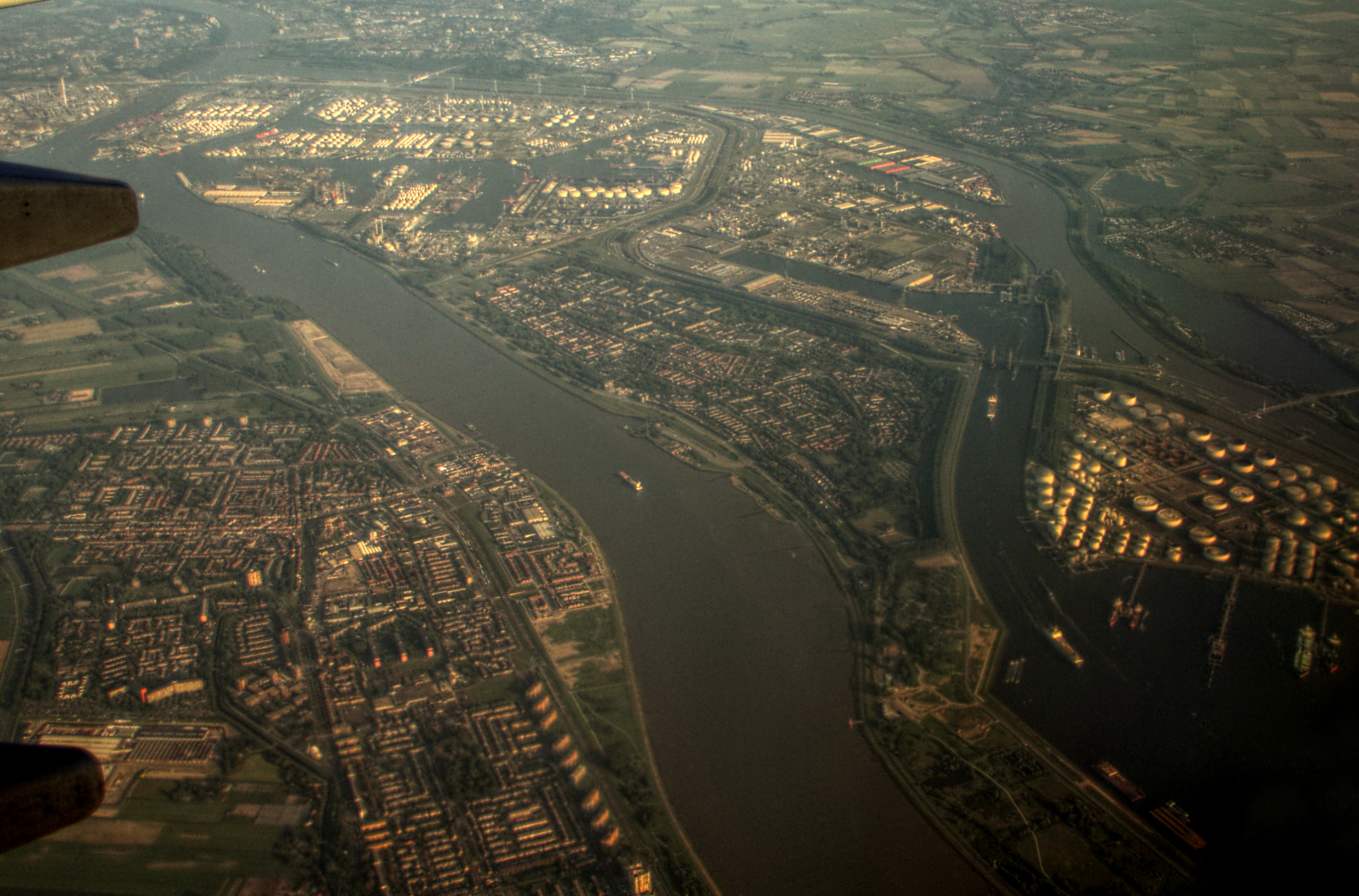 Luchtopname van de stad Maasluis en het eiland Rozenburg. Juni 2013